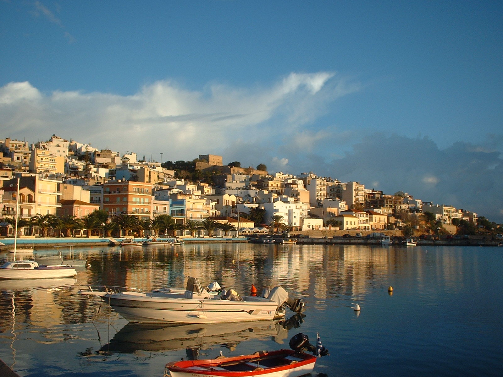 Amanecer en Sitia